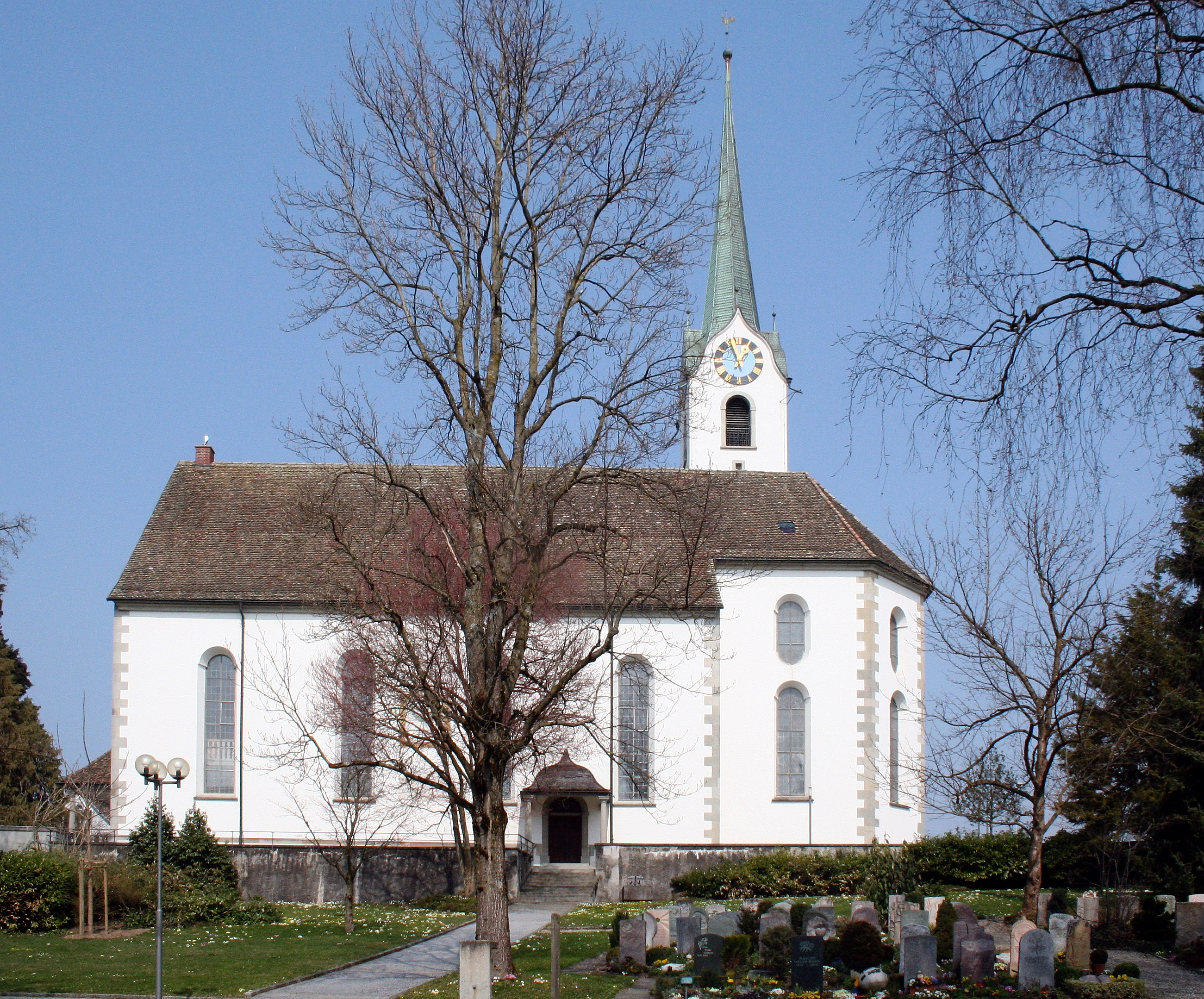 ref. Kirche Hombrechtikon